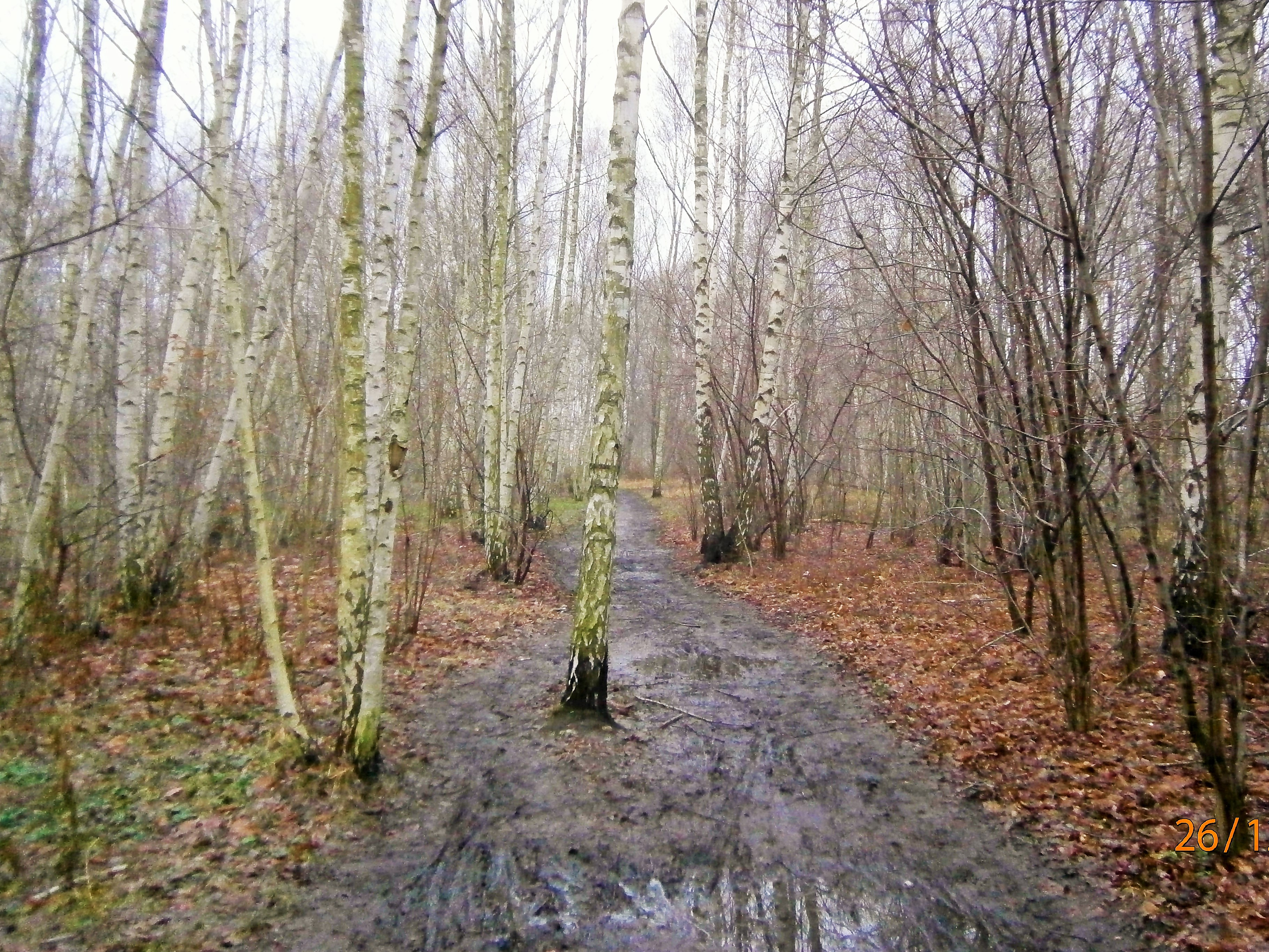 Die Kopenhagener Straße ist eine Straße in Berlin-Wilhelmsruh, die sich nach Süden in Reinickendorf fortsetzt. Hier der Lübarser Weg im Birkenwäldchen auf dem vormaligen Mauerstreifen, neben dem Berliner Mauerweg. Östlich der Kopenhagener Straße.